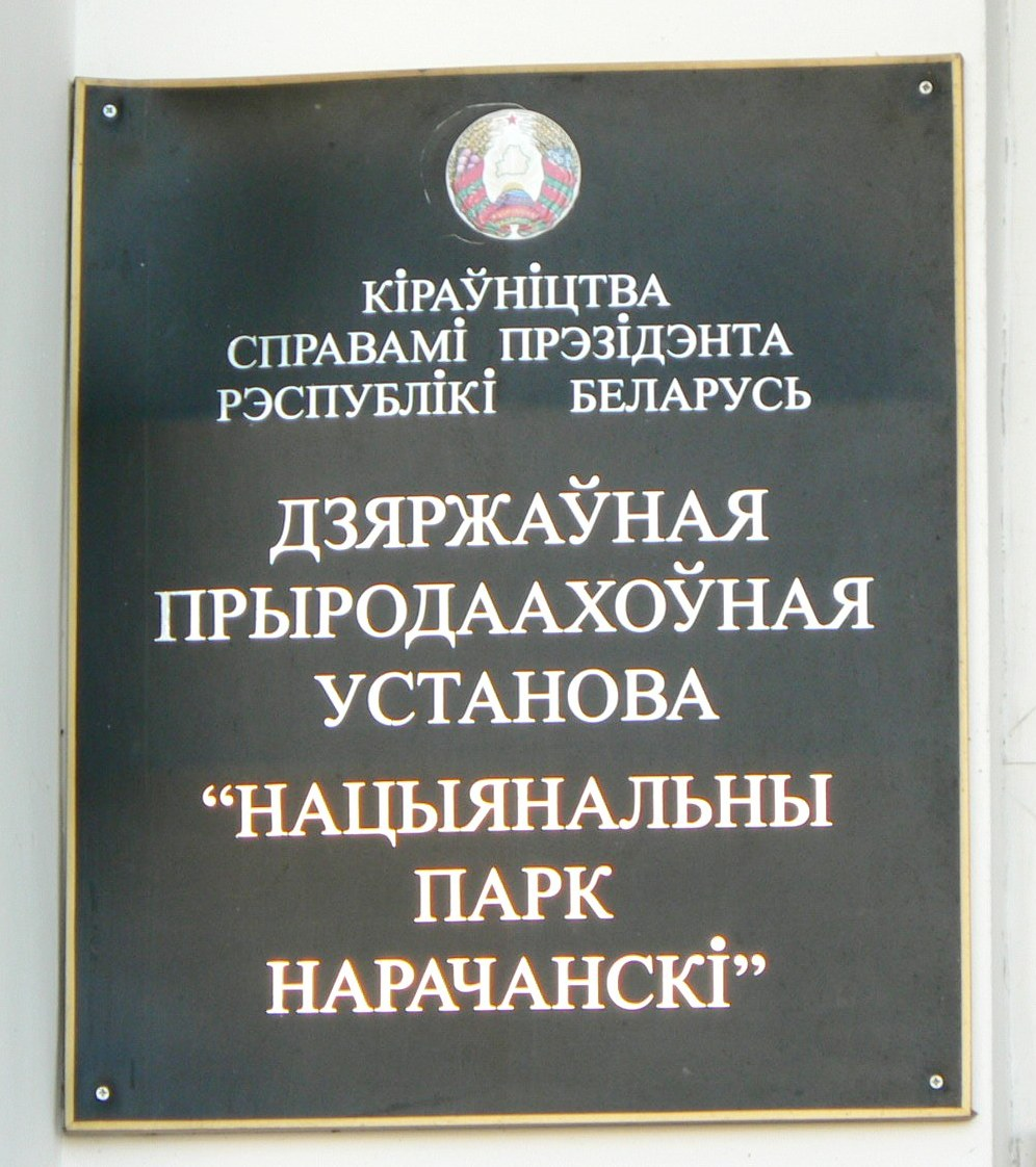 Tablica informacyjna na siedzibie Parku Narodowego "Naroczański" na Białorusi.